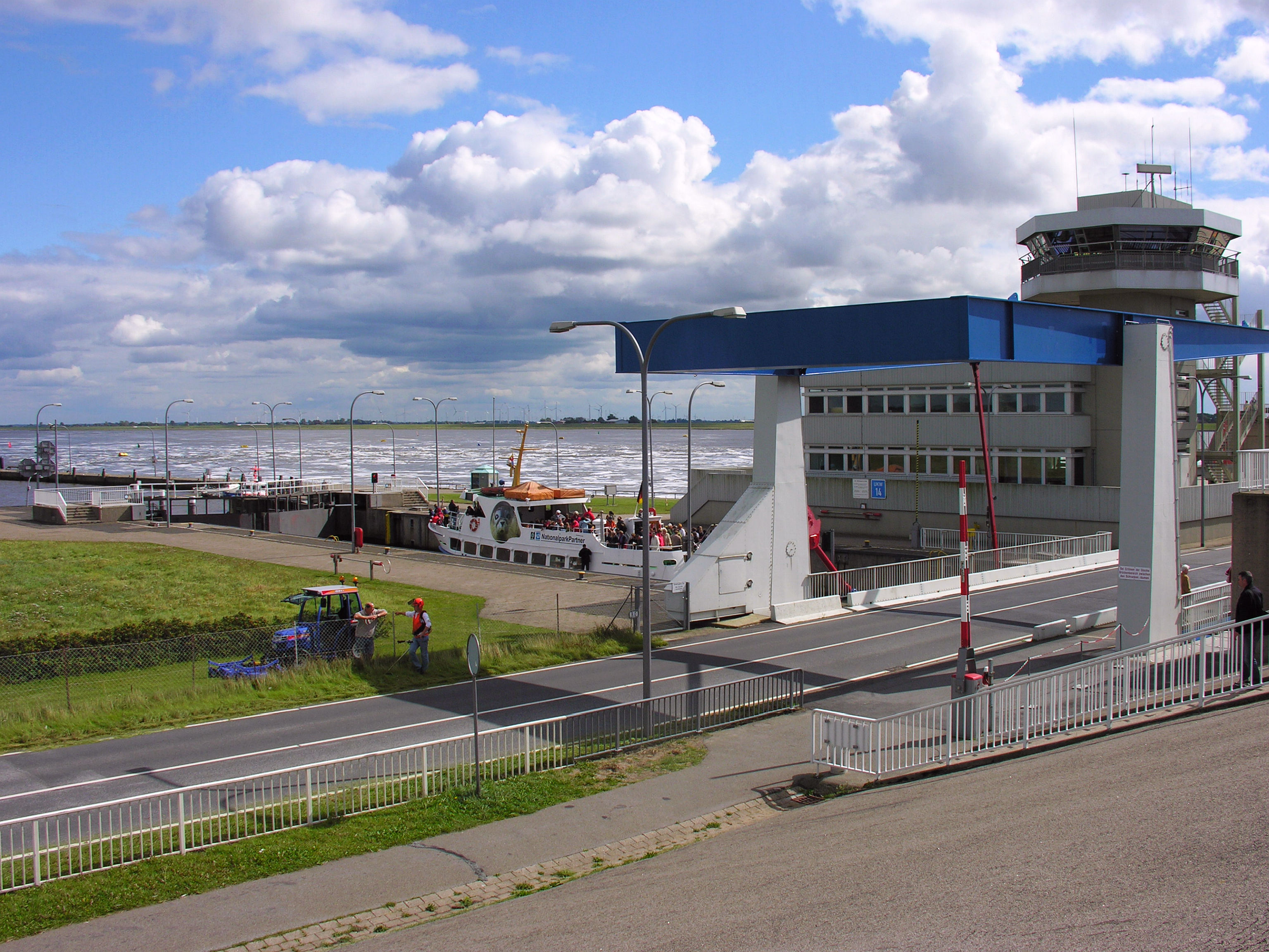 Das Eidersperrwerk in der Ansicht von Norden. Anlage mit Klappbrücke, Kontrollturm, Schleuse und SH-Landesstraße 305 (durch überirdischen Tunnel). Eider-Schleuse und Sturmflut-Schutzbauwerk bei Tönning an der Nordsee. Foto Wolfgang Pehlemann IMG_0264